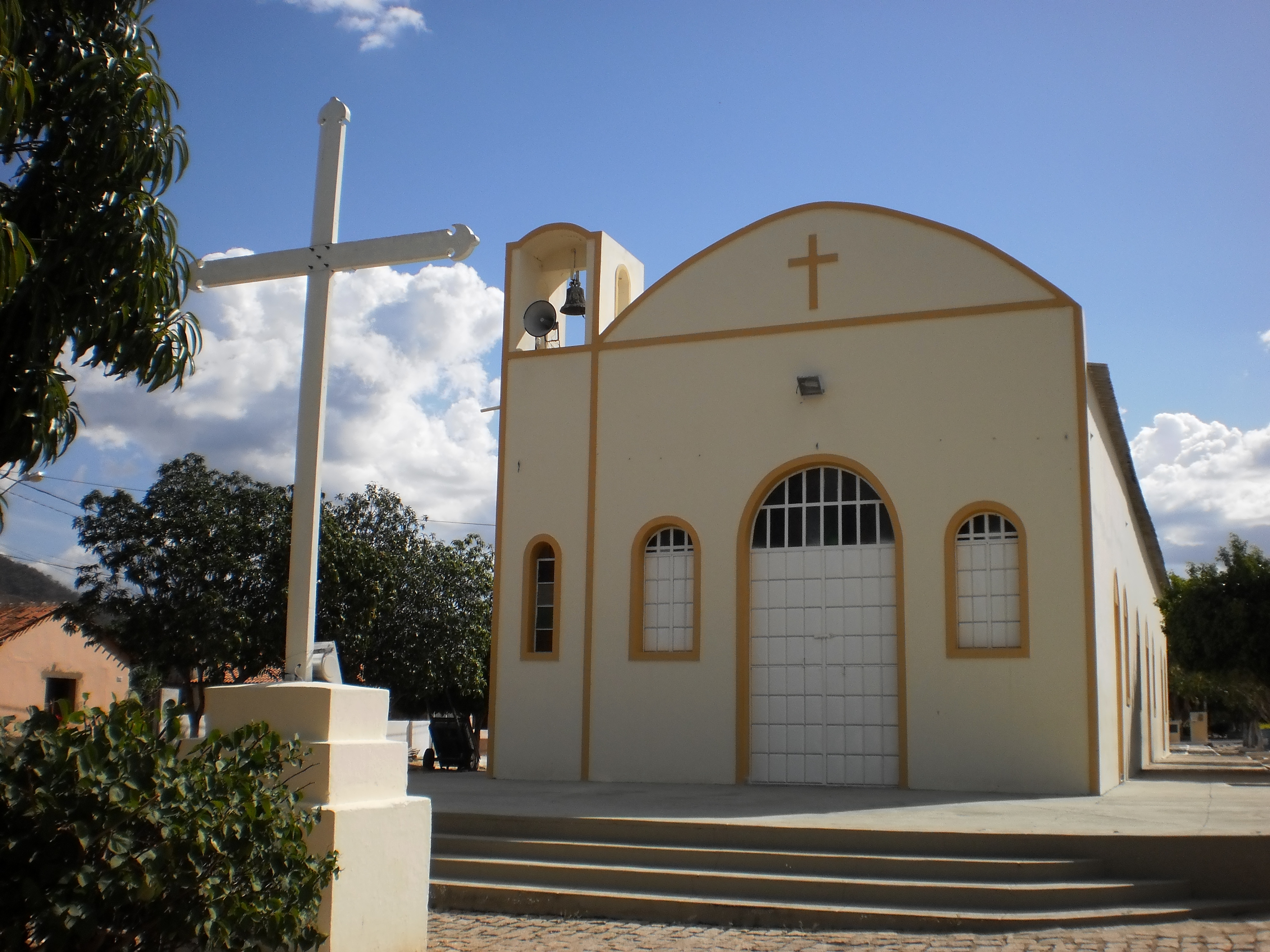 Capela Nossa Senhora do Perpétuo Socorro, pertencente à Paróquia Nossa Senhora da Conceição de Portalegre, em Viçosa, Rio Grande do Norte, Brasil.